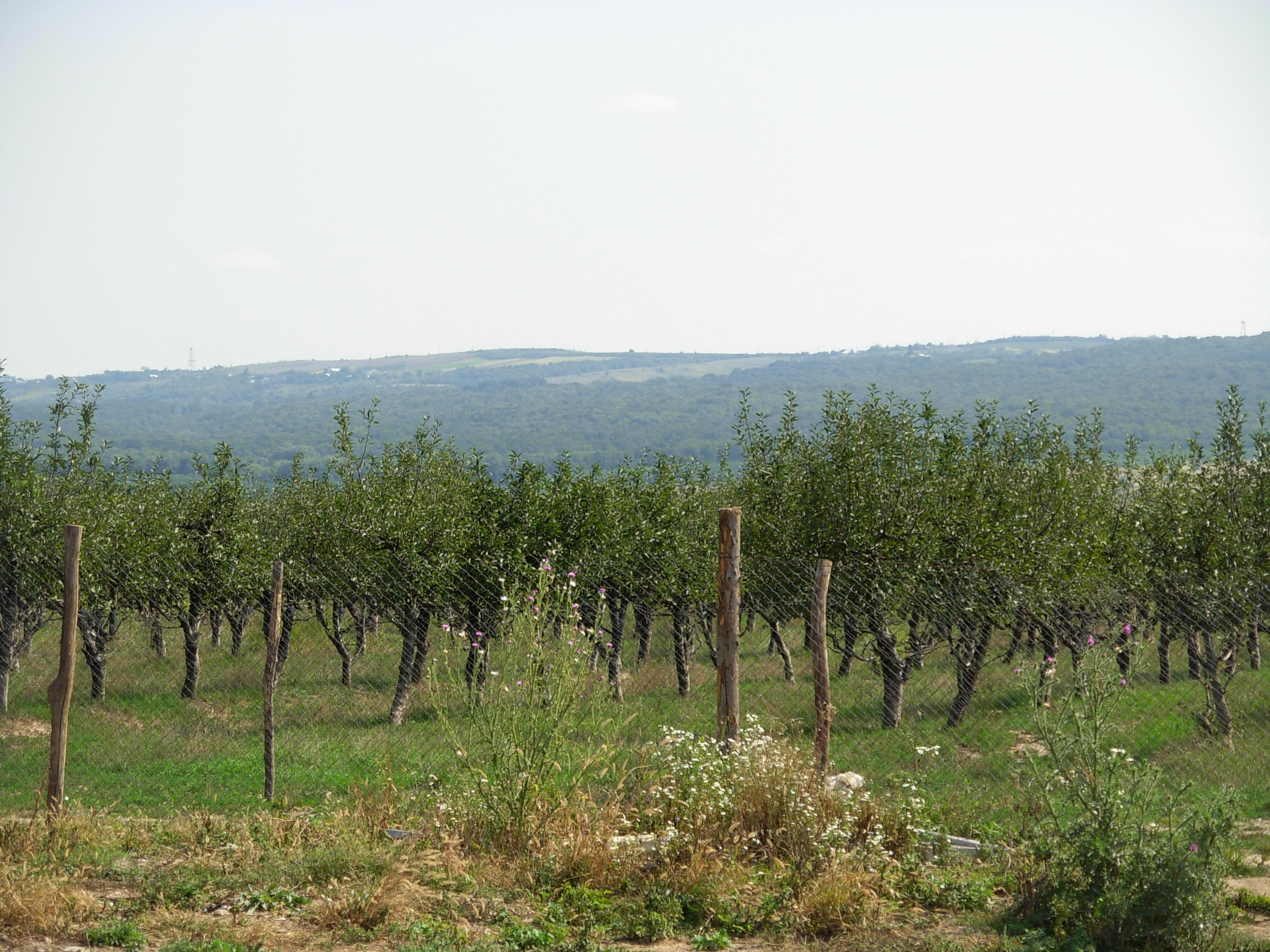 Livada de meri - sat Galmeia